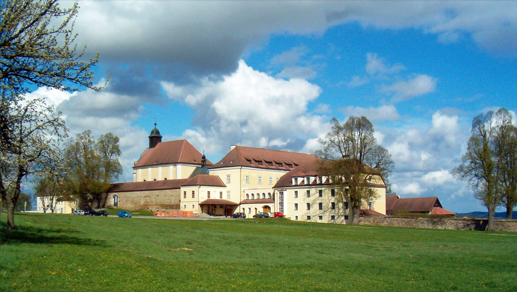 Kostel P. Marie Karmelské s budovou kláštera karmelitánů v Kostelním Vydří